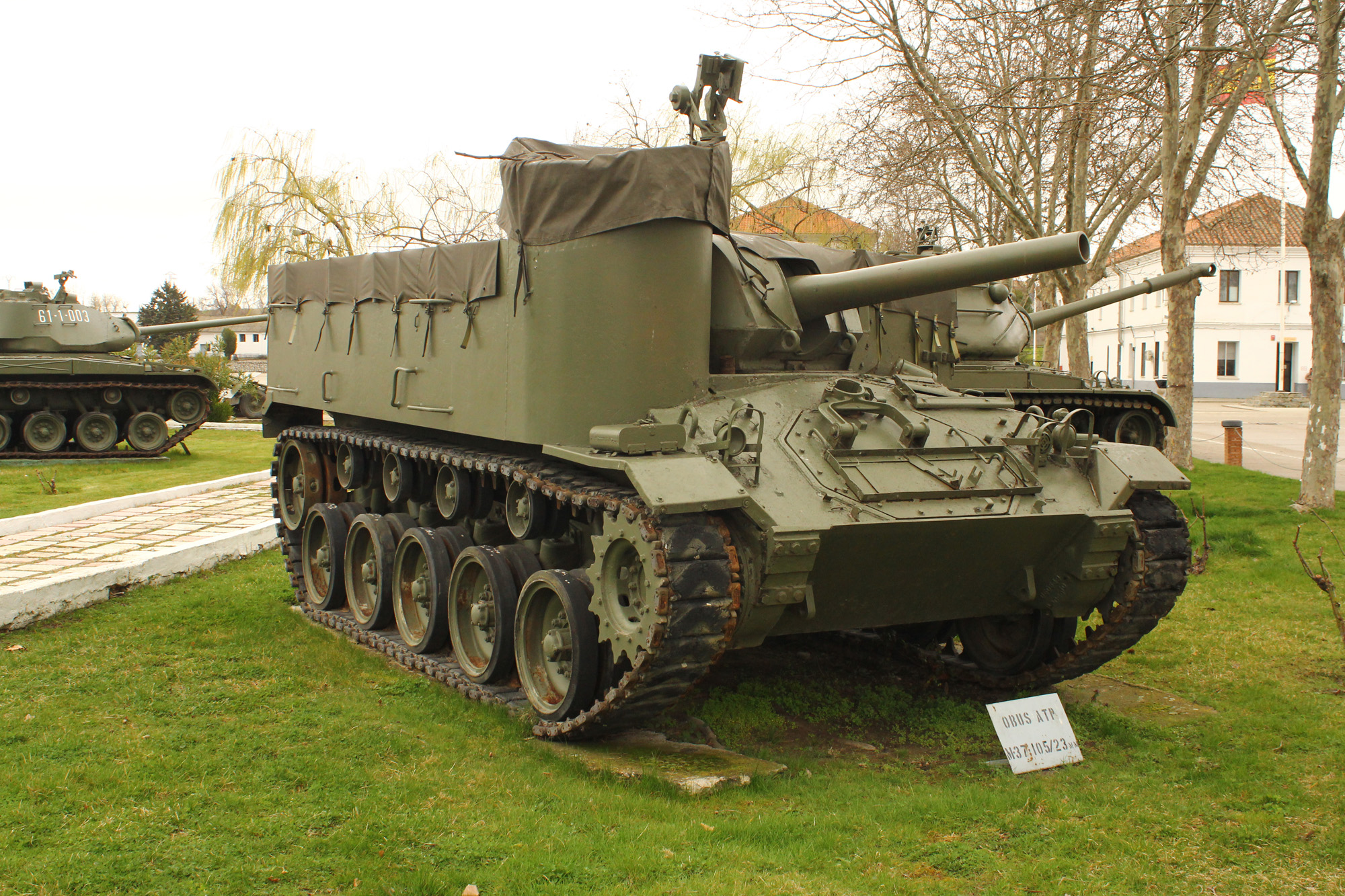 Obús autopropulsado M-37, con un cañón de 105 mm. Es un modelo construido en Estados Unidos desde 1943, durante la Segunda Guerra Mundial, usando como base el chasis del tanque ligero M-24 General Chafee. Llegó a España en 1957. El Ejército español operó 28 unidades, que fueron jubiladas en 1970. Armored Units Museum of El Goloso M-37 self-propelled howitzer, with a 105 mm canon. It is a model built in the U.S. since 1943, during World War II, using as a basis the chassis of the light tank M-24 General Chafee. It arrived to Spain in 1957. The Spanish Army operated 28 units, which were retired in 1970.